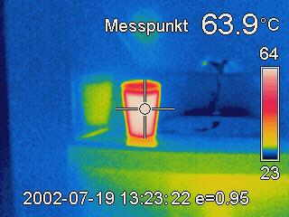 Das Bild zeigt eine typische Thermographie mit einem Messpunkt (Fadenkreuz) in farbcodierter Darstellung. Dabei werden die Farben verwendet um unterschiedliche Temperaturen anzuzeigen. Auf der linken Seite sieht man sehr schön eine "Spiegelung", die Thermostrahlung wird vom (matt-braunen) Kunststoffgehäuse des Automaten reflektiert. In der Fußzeile wird das Datum und der Emissionsfaktor angegeben.